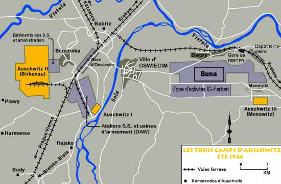 Plan de situation des trois camps d'Auschwitz